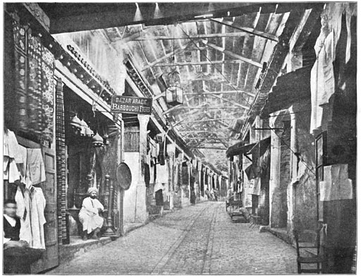 "In den Souk der zijdewevers"